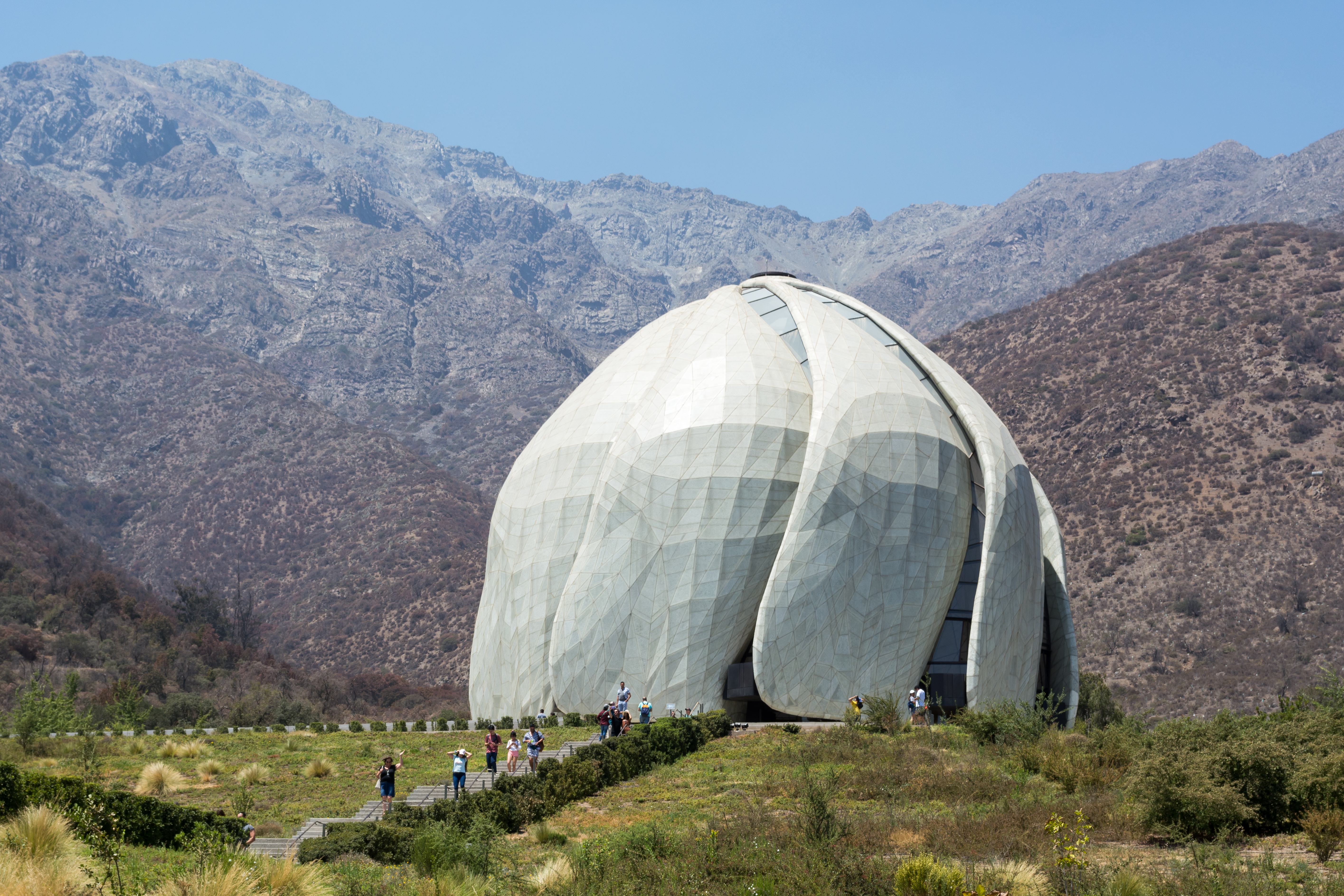 Templo Bahá'í de Sudamérica, Peñalolén, Santiago, Región Metropolitana, Chile